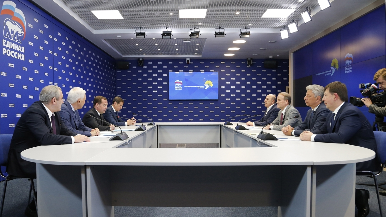 Председатель Правительства России – председатель партии «Единая Россия» Дмитрий Медведев встретился с главой стратегического совета, председателем политсовета политической партии «Оппозиционная платформа – За жизнь» Виктором Медведчуком, сопредседателями партии Юрием Бойко и Вадимом Рабиновичем и членом политсовета партии Тарасом Козаком. С российской стороны во встрече приняли участие: председатель Высшего совета партии «Единая Россия» Борис Грызлов, член Высшего совета партии, первый заместитель Председателя Государственной Думы Александр Жуков и член президиума Генерального совета партии «Единая Россия», заместитель Председателя Государственной Думы Сергей Неверов.